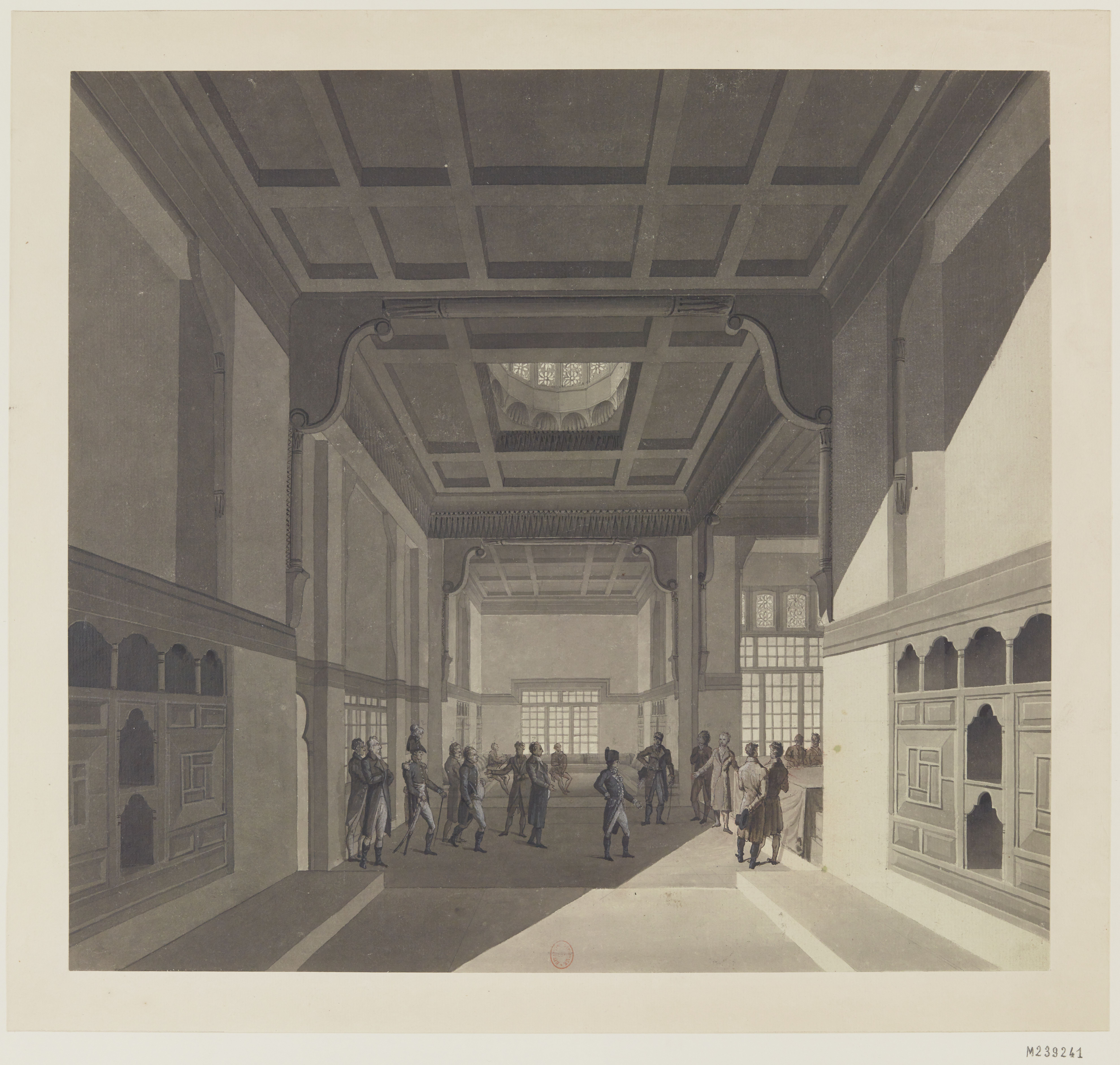 Salle dans l'Institut d'Egypte -J C Protain (c 1800)